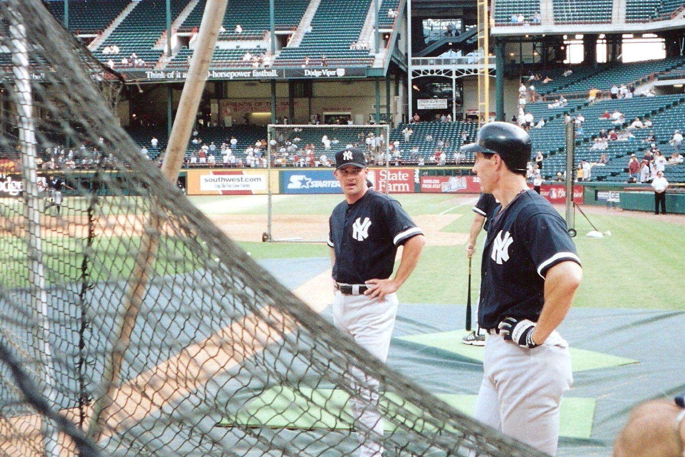 Denbo O'Neill 2001